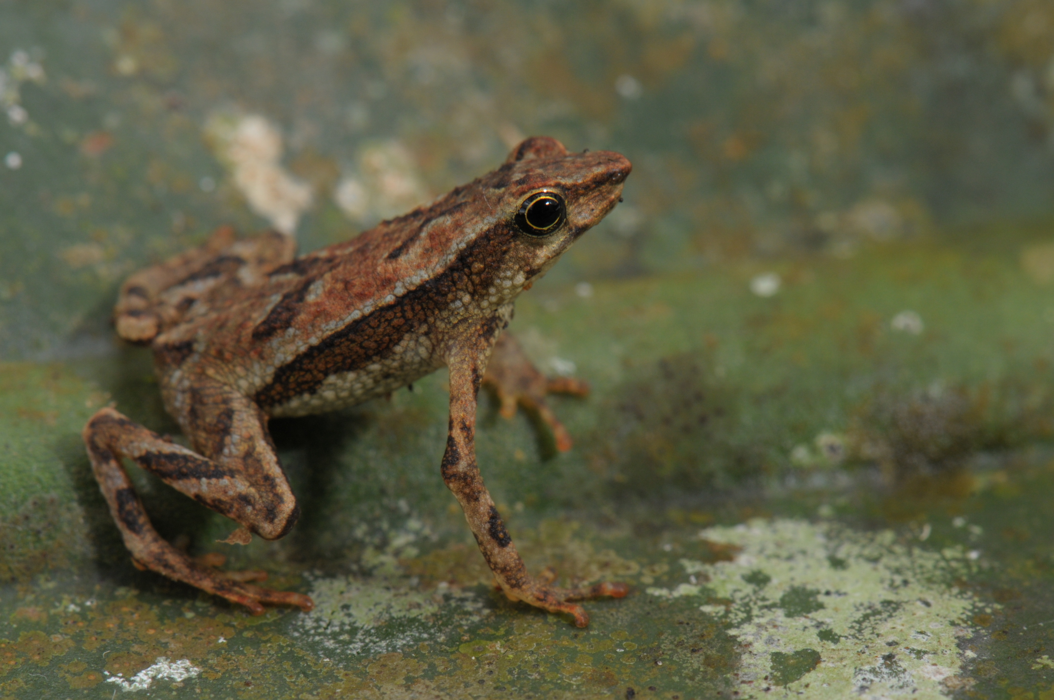 Sapo - de - bromélia - Dendrophryniscus brevipollicatus - Espécie endêmica da Mata Atlântica, cujo ciclo de vida é completamente dependente de bromélia.